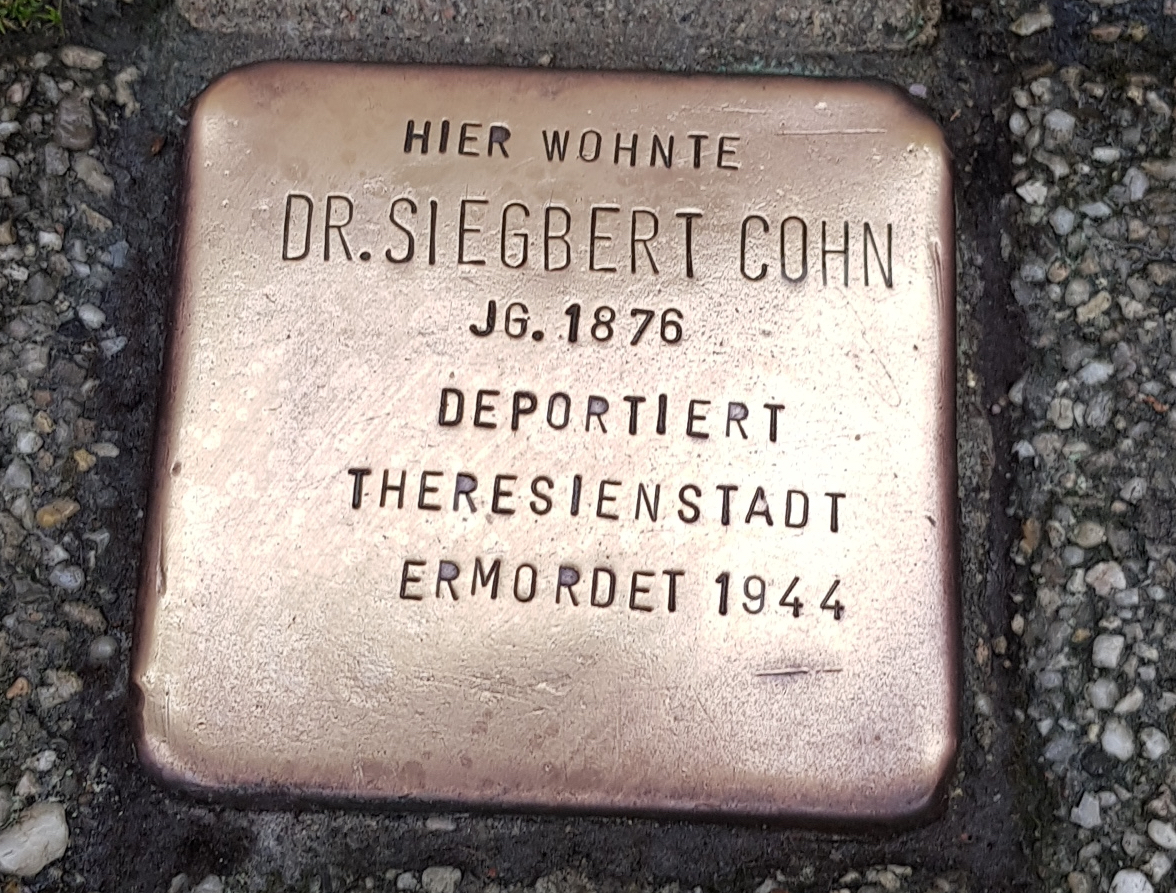 Ort: Bechemstr. 6, 47058 Duisburg-Duissern